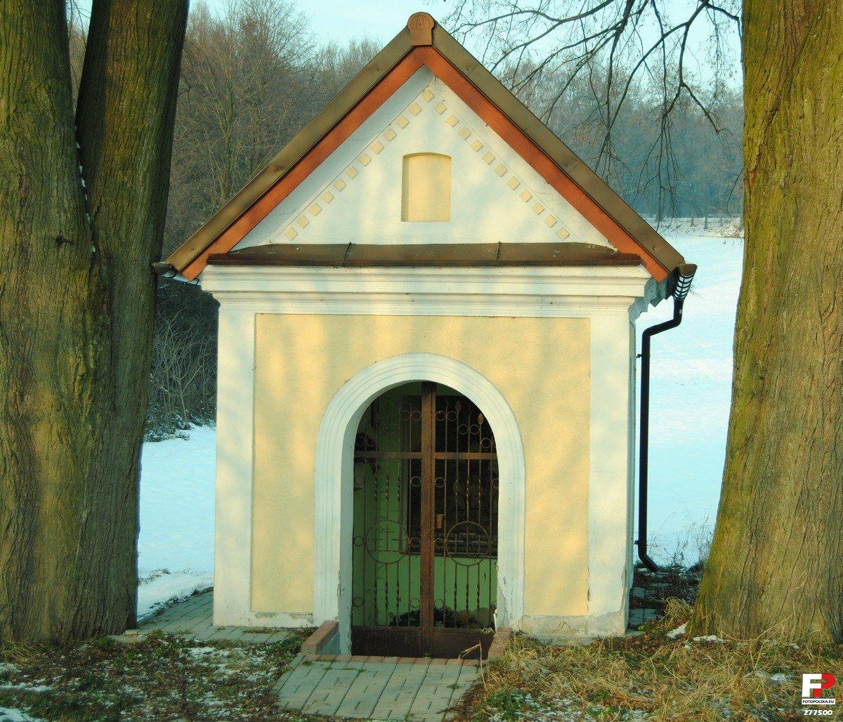 Kapliczka przydrożna na trasie Góra św Anny - Zdzieszowice